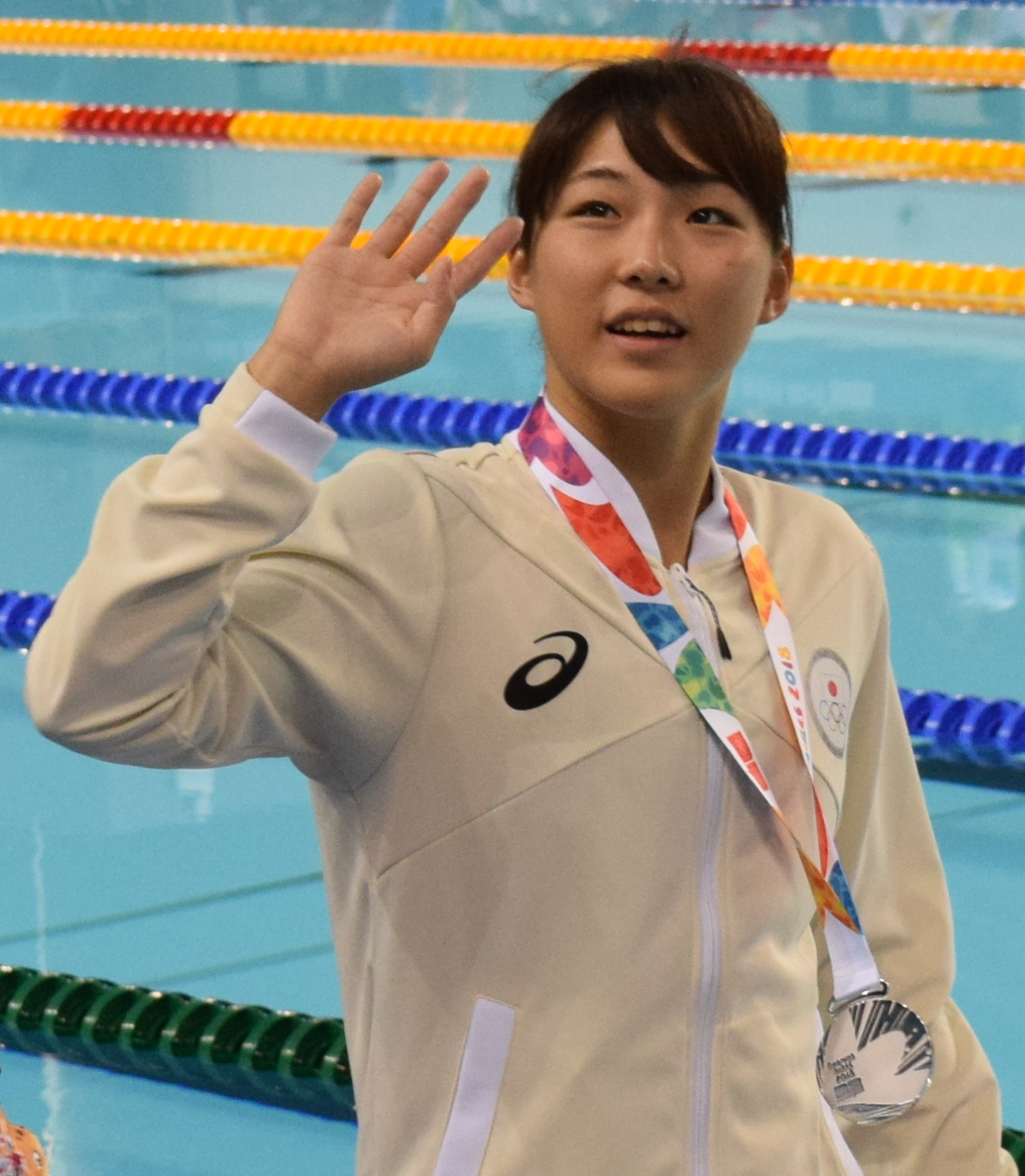 Finales de natación , durante los Juegos Olímpicos de la Juventud 2018 en Buenos Aires. Tarde del 10 de octubre. Junxuan YANG, Mayuka YAMAMOTO y Barbora SEEMANOVA.